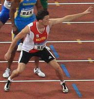 Relais 4x400 m Jeux olympiques d'été de 2008 – Arnaud Ghislain